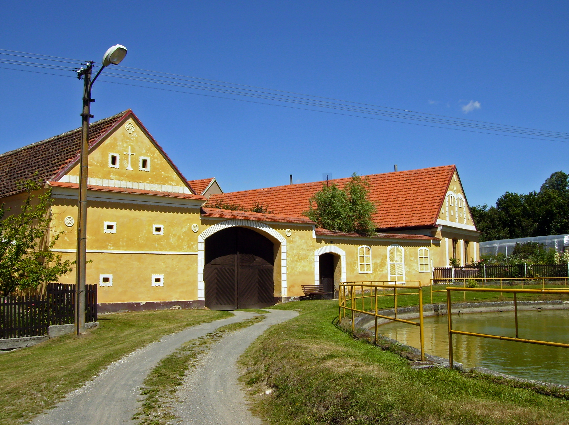 Záluží u Vlastiboře v okrese Tábor - náves